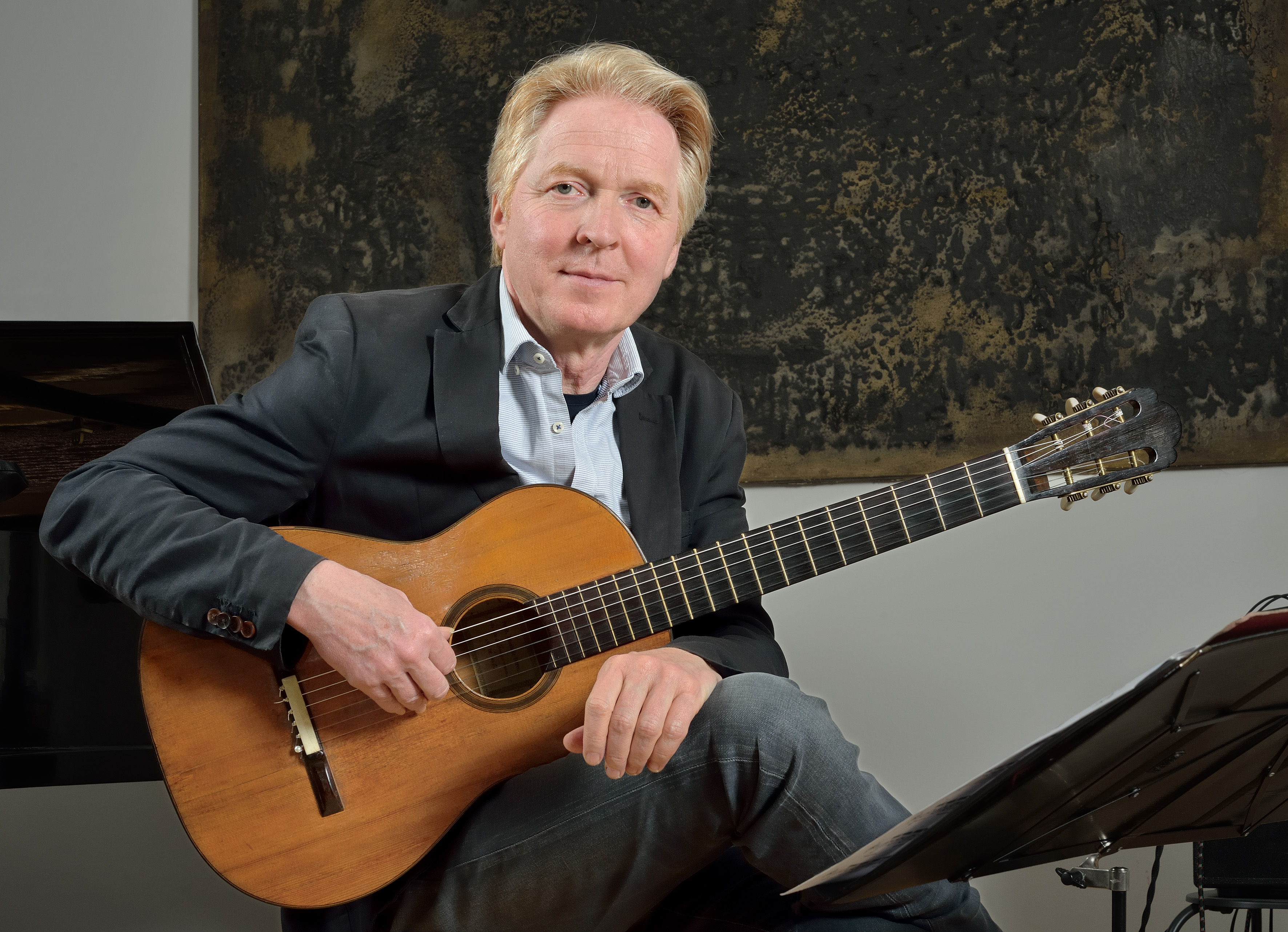 Wulfin Lieske mit "La Leona" anlässlich des Symposion zum 200. Geburtstag von Antonio de Torres beim FORUM LIESKE in Köln am 20. Mai 2017.